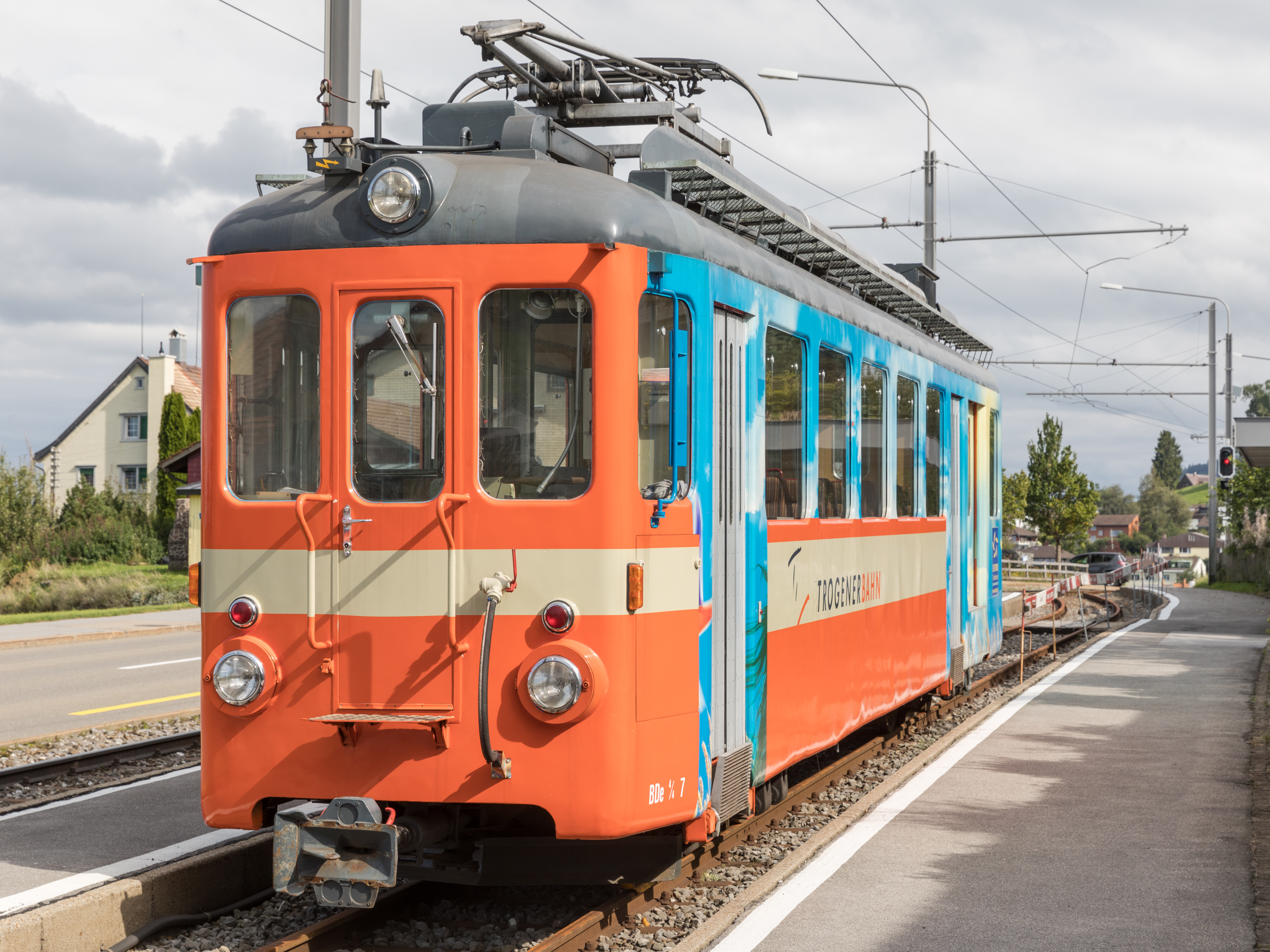 Historischer Triebwagen BDe 4/4 Nr. 7 der Trogenerbahn abgestellt an der Haltestelle Bendlehn.